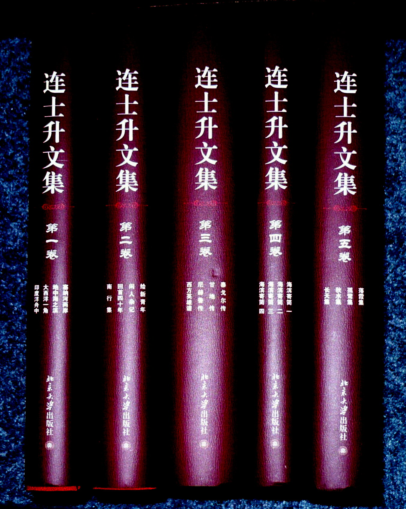 连士升文集，北京大学出版社出版。唐戈藏书。